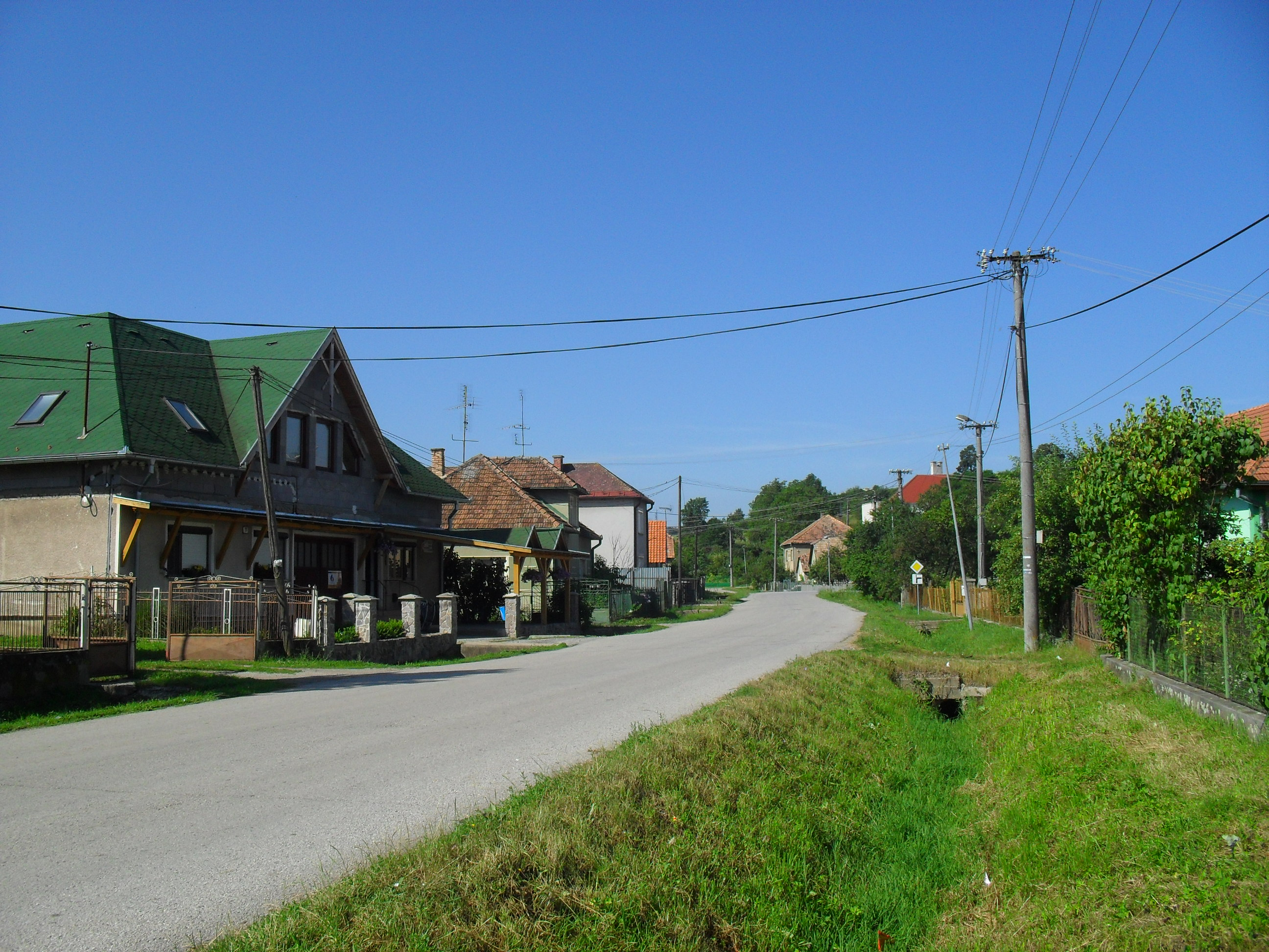 Kálosa - utcakép